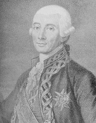 John Francis Edward Acton, Gemälde von Bartolozzi, Museo di San Martino, Neapel